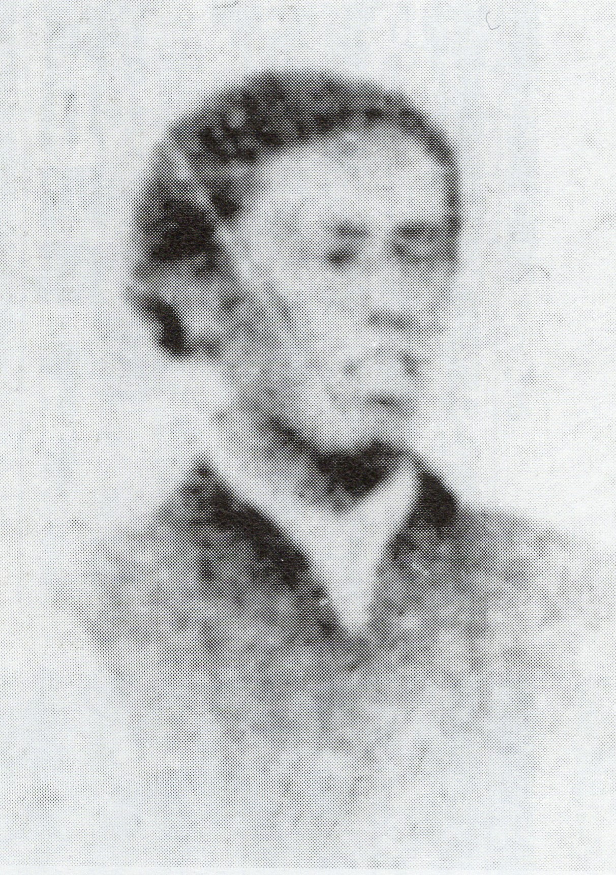 時山直八の肖像写真。